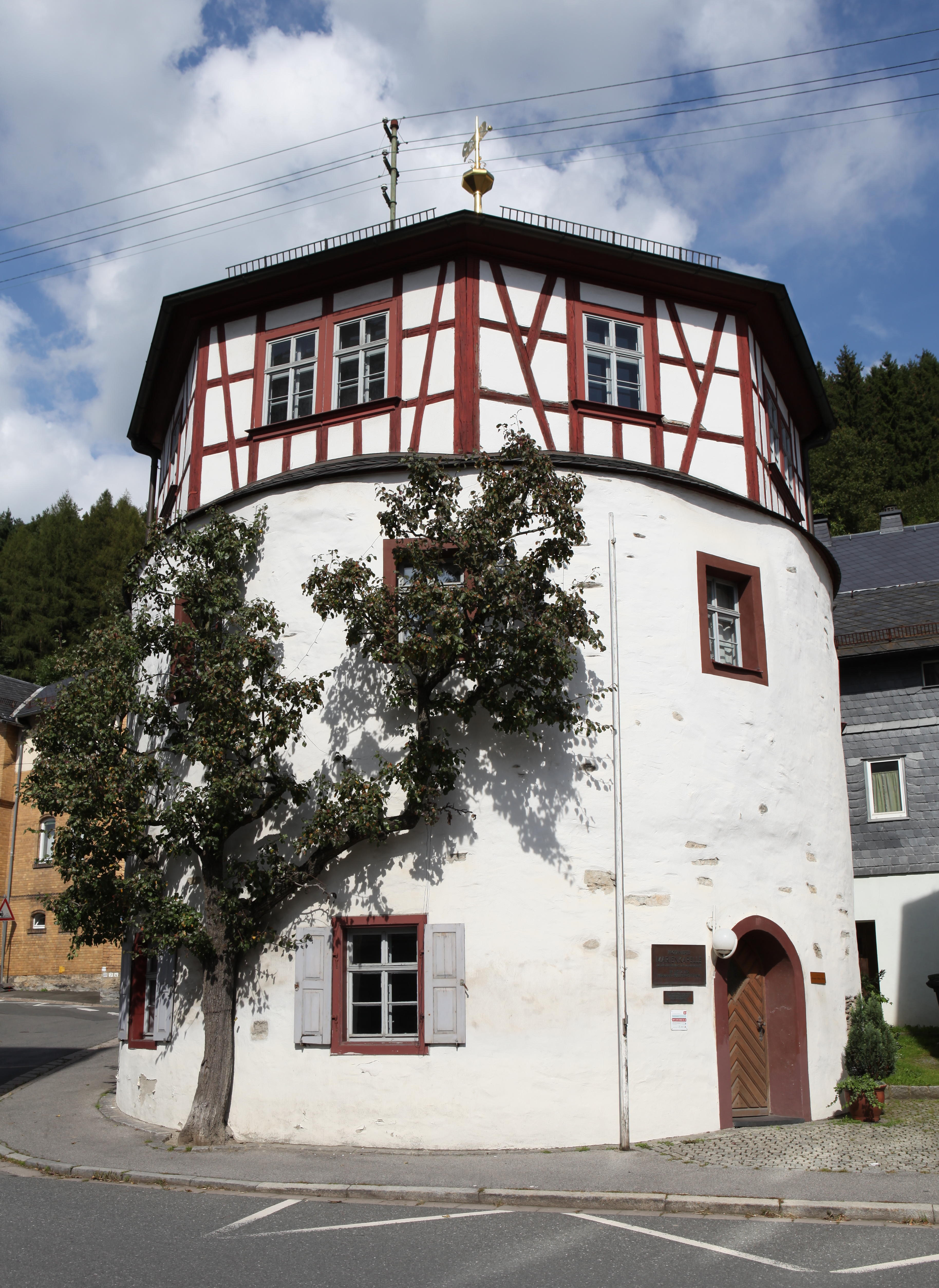 Profanierte Marienkapelle in Ludwigsstadt, Landkreis Kronach